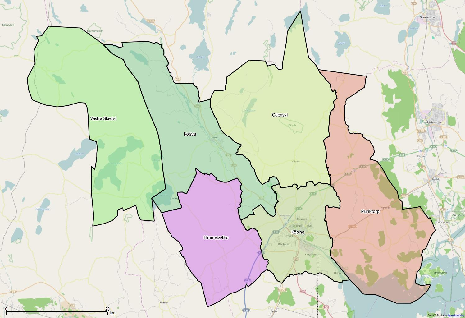 Distriktsindelningen i Kristinehamns kommun World file: 61.23106049158712949 0 0 -61.23106049158712949 1721530.98046835931017995 8338195.41024971567094326